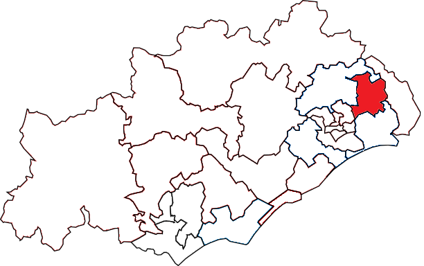 Situation du canton dans le département de l'Hérault